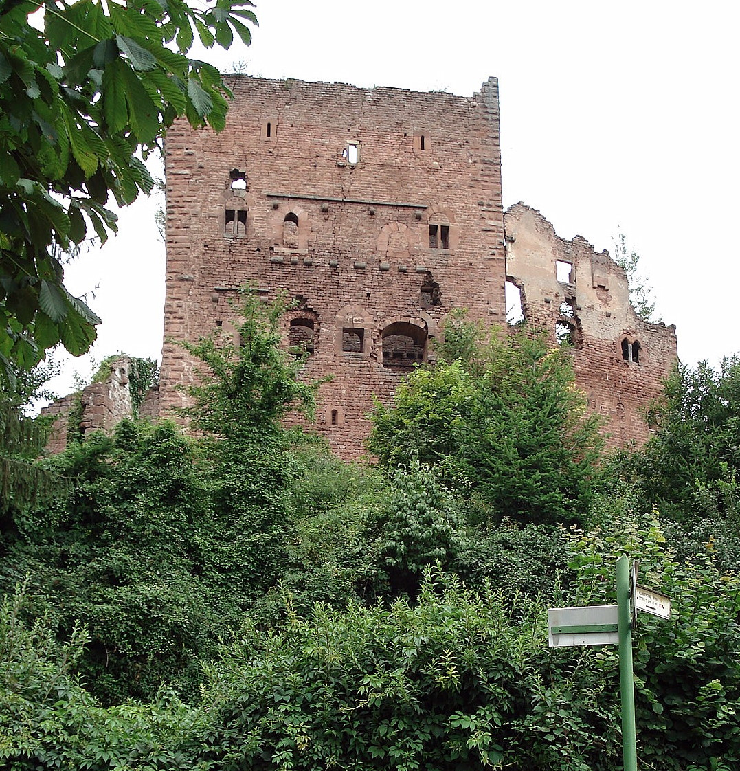 Ottrott, Alsace, France: château ruiné de Rathsamhausen